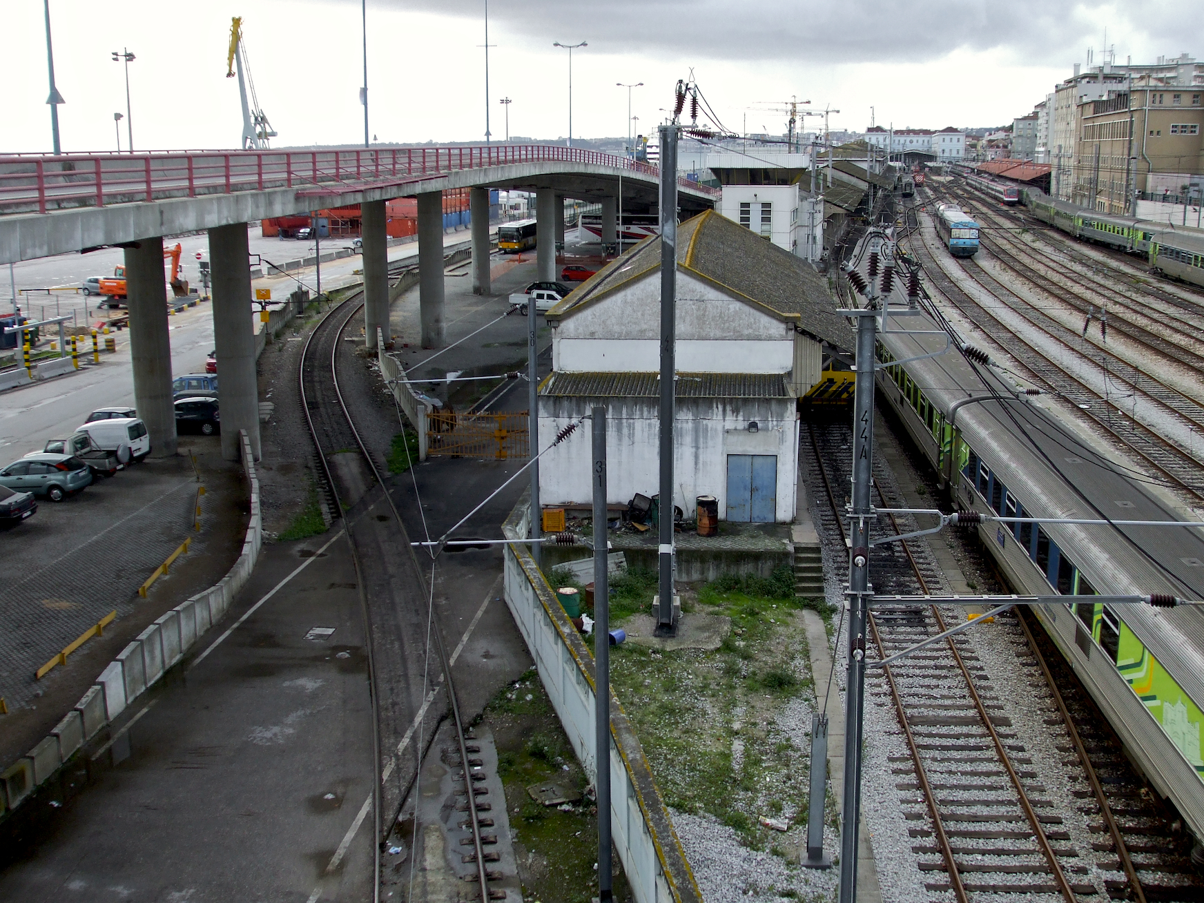 à esquerda, o acesso à Linha da Matinha. Tipo: E Estação Local: Lisboa Linha do Norte, PK 0,0 Data e hora: 29 de Novembro de 2009 11h58